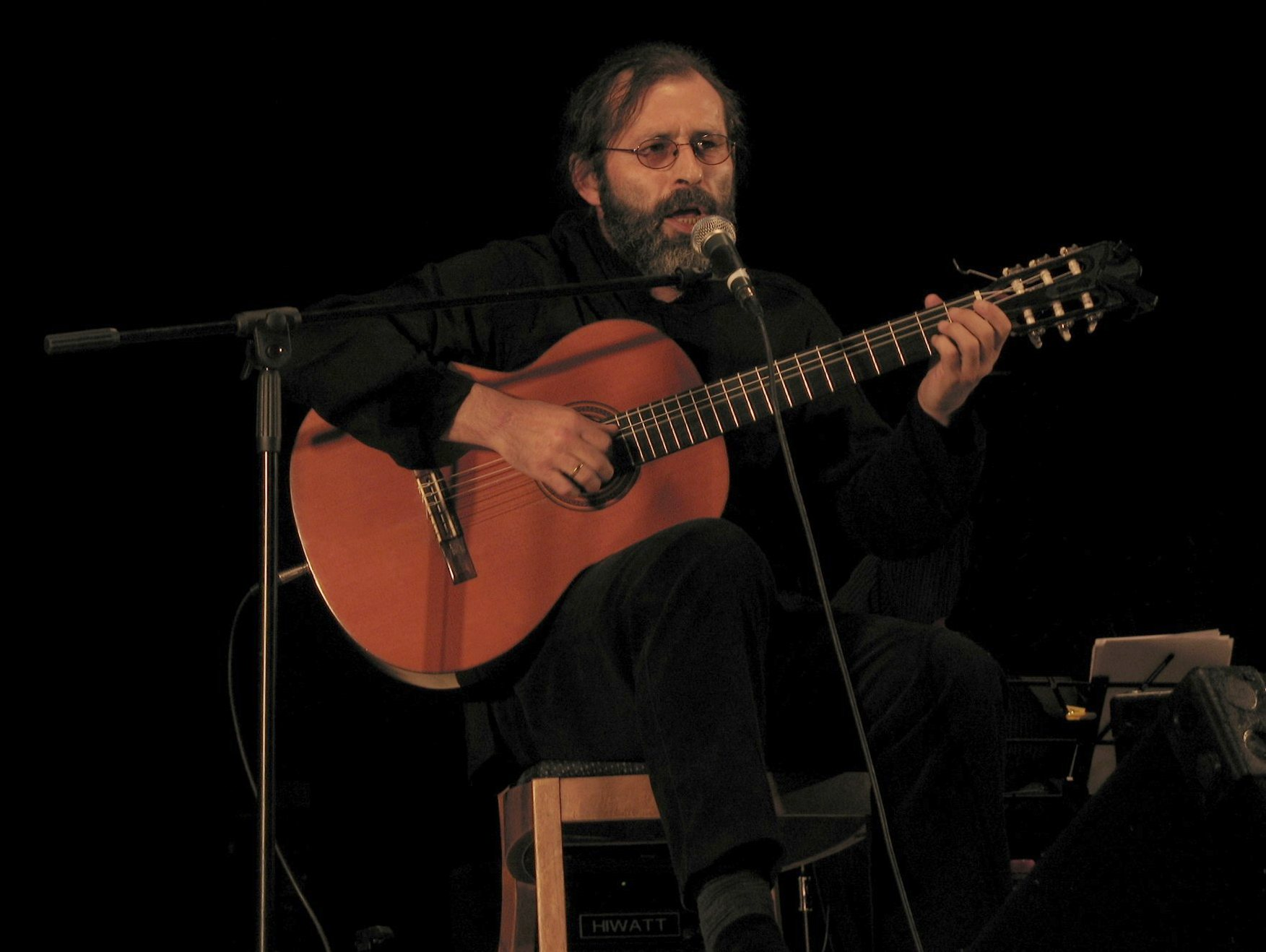 Antoni Muracki w Czasie koncertu w Zielonej Górze. 2007 rok